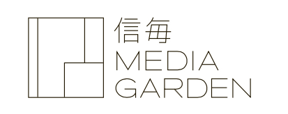 信毎メディアガーデンのロゴデザイン。